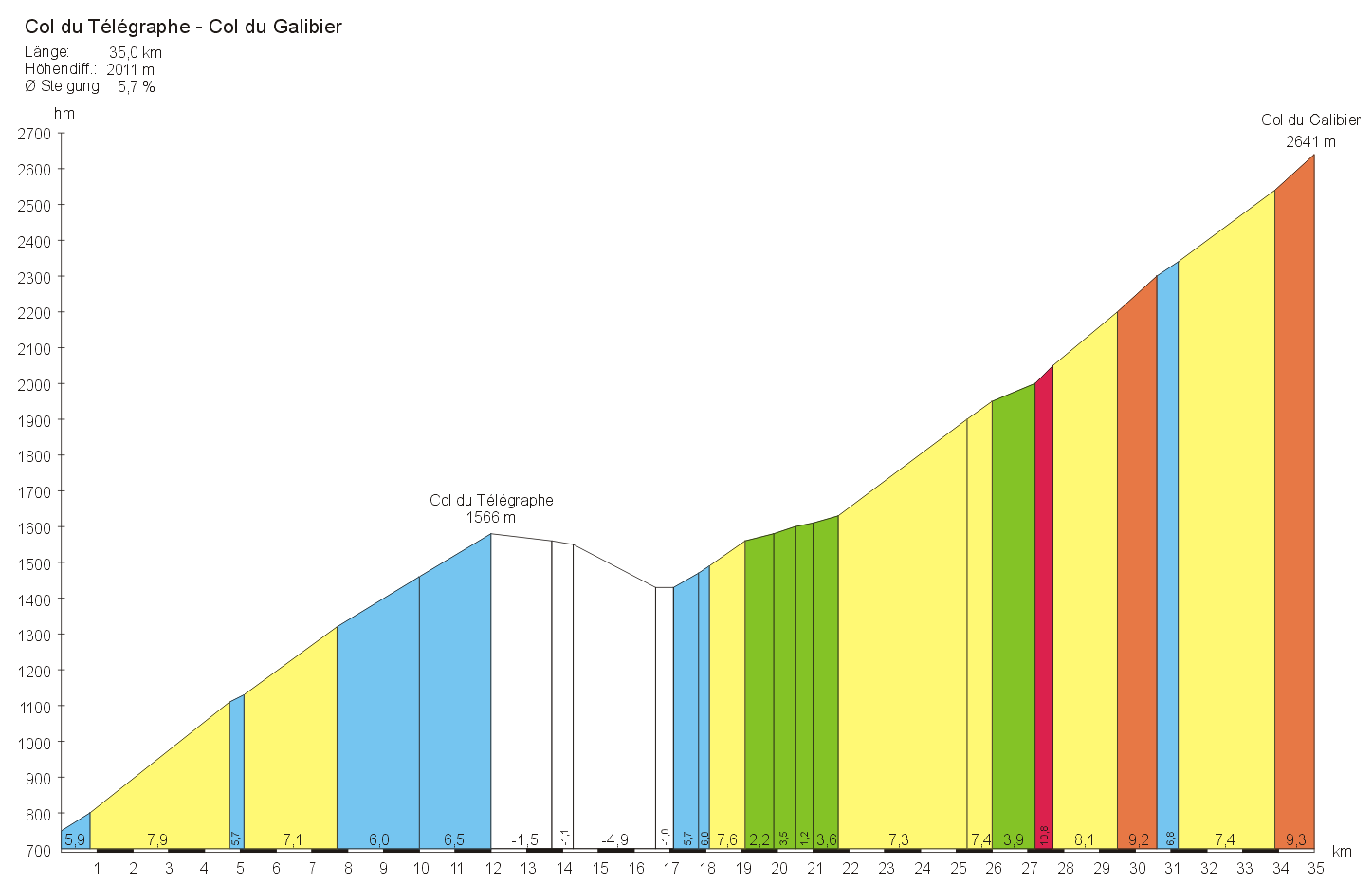 Steigungsprofil des Col du Galibier mit dem vorgelagerten Col du Telegraphe, Nordrampe von St.Michel-de-Maurienne aus